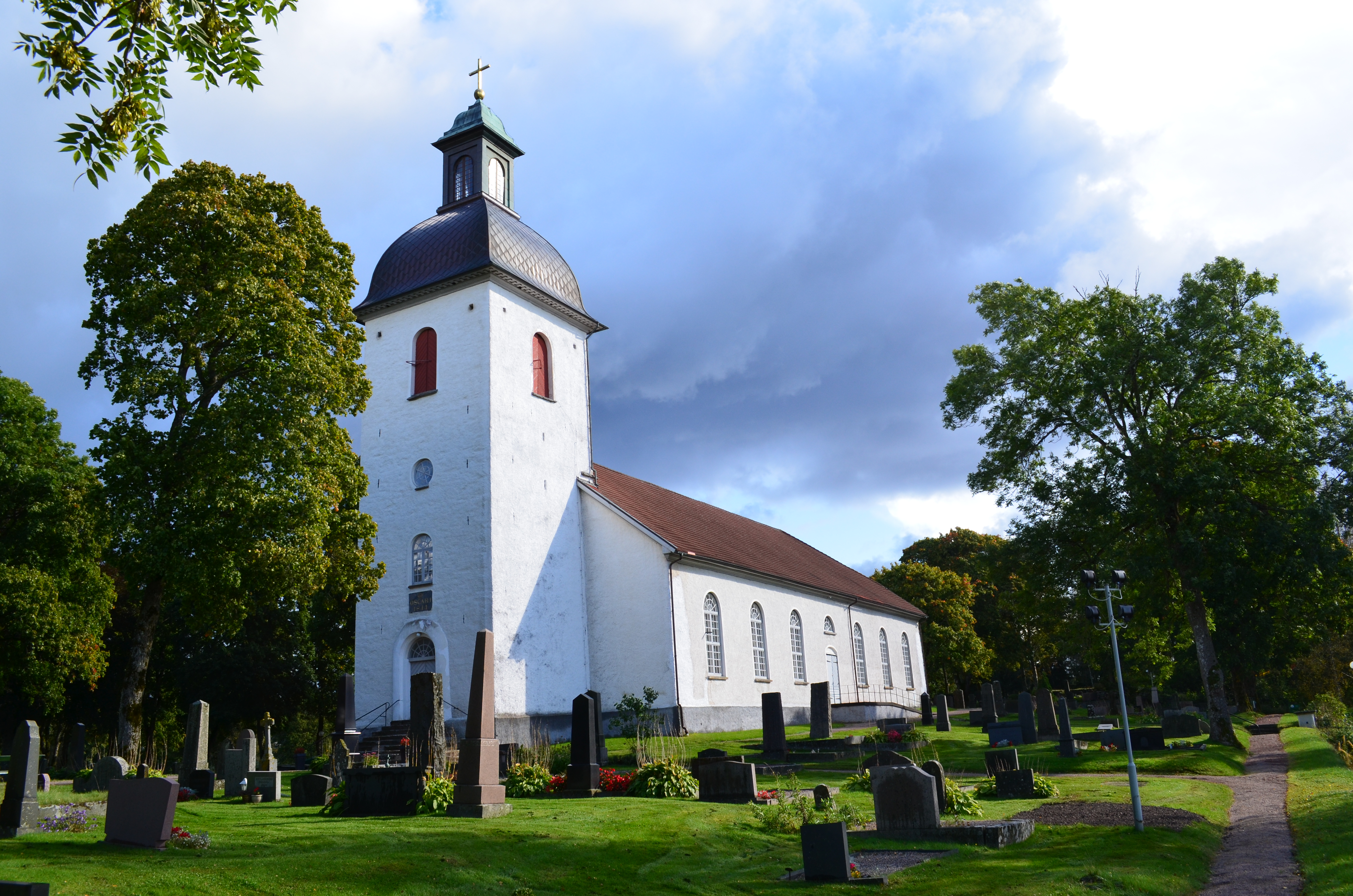 Bollebygds Kyrka, uppförd 1844.